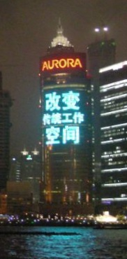 Aurora Plaza at night, Shanghai